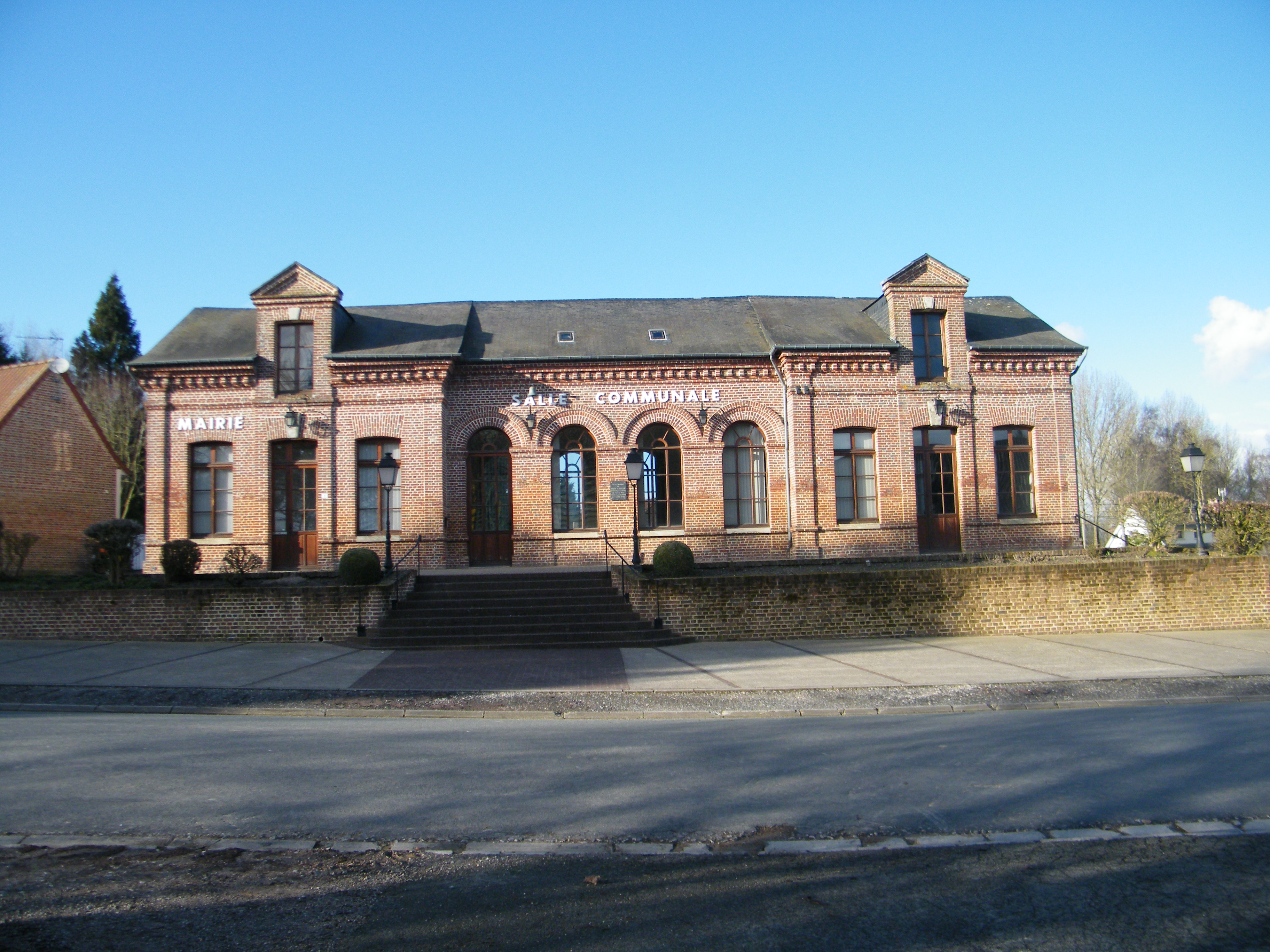 La mairie.